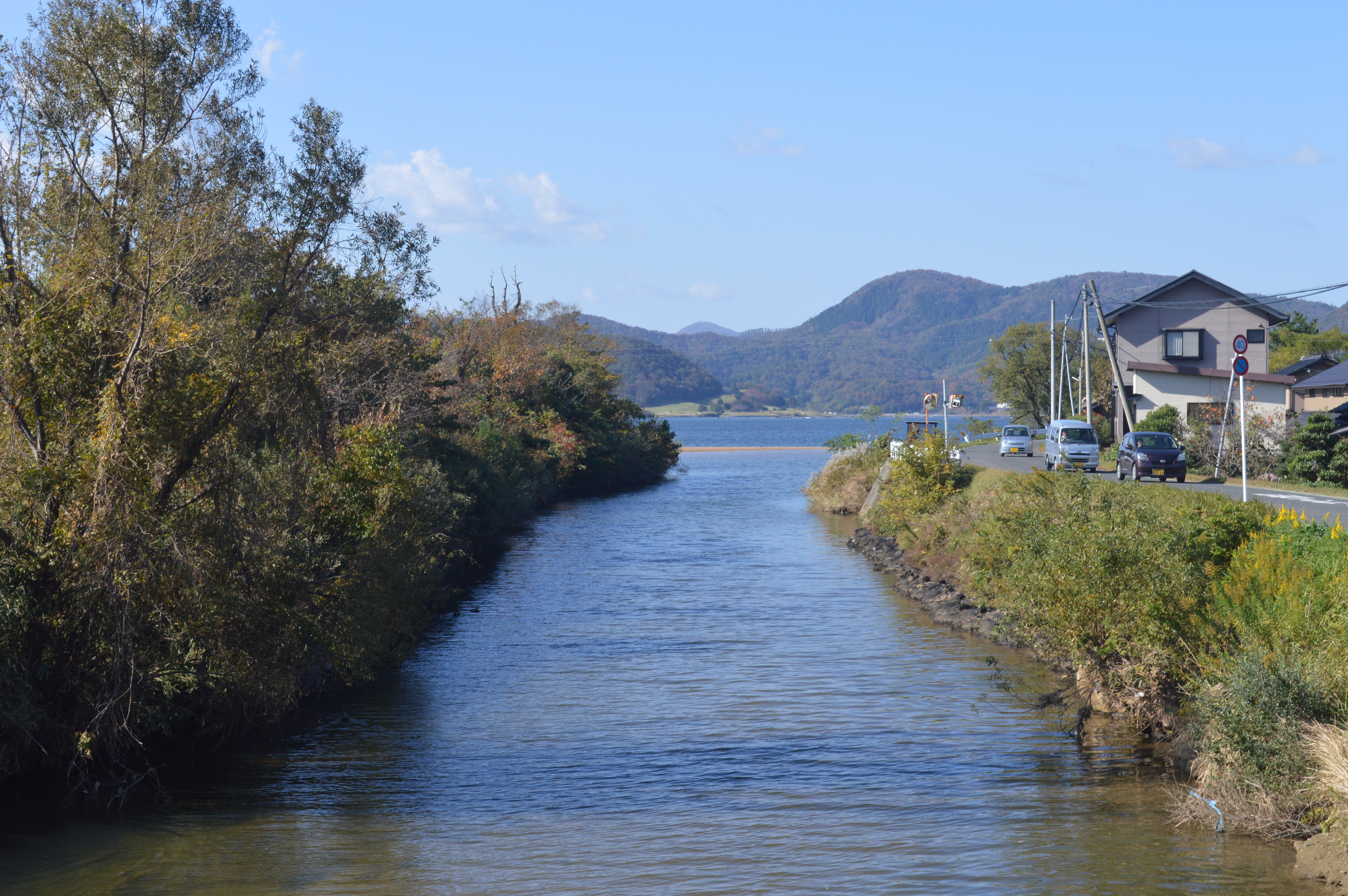 京丹後市久美浜町の佐濃谷川。河口部から下流を向いて撮影。奥は久美浜湾。